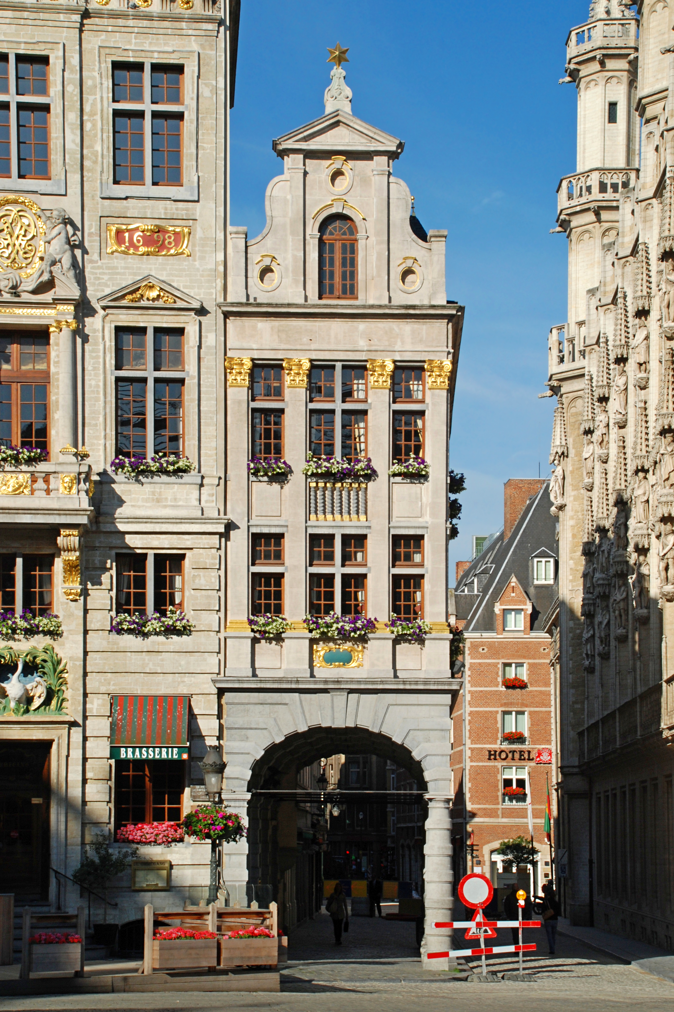 Belgique - Bruxelles - Grand-Place n°8 - Maison de l'Étoile